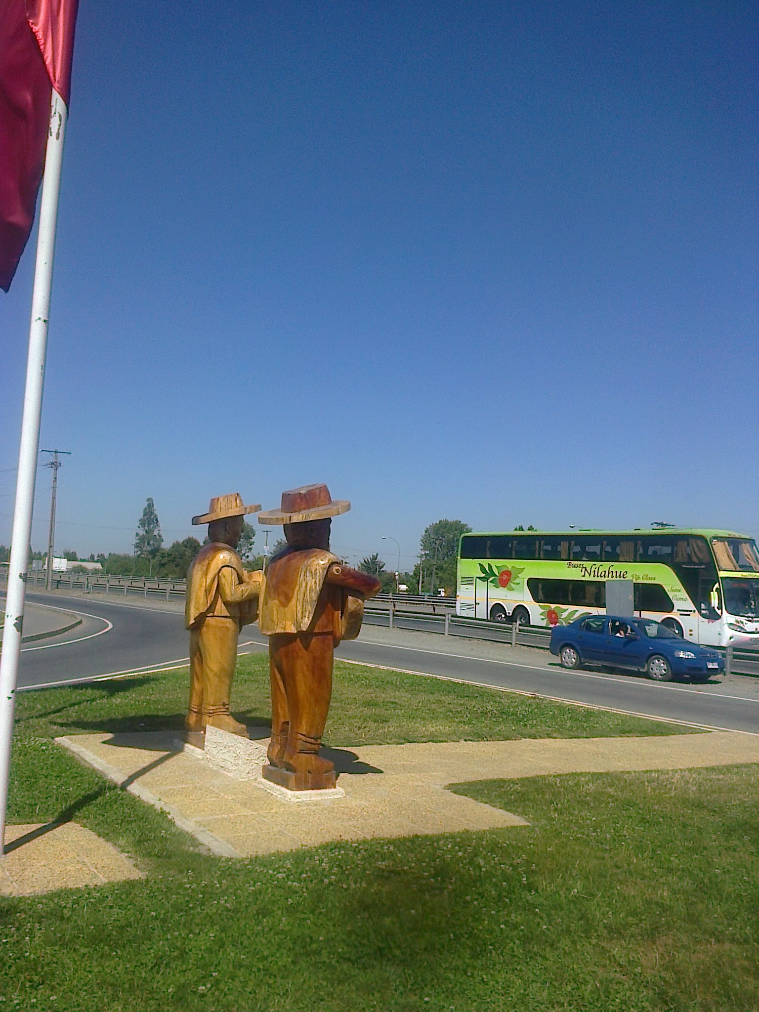 Monumento en la entrada a Longaví a los Hermanos Campos, folcloristas oriundos de esa ciudad.